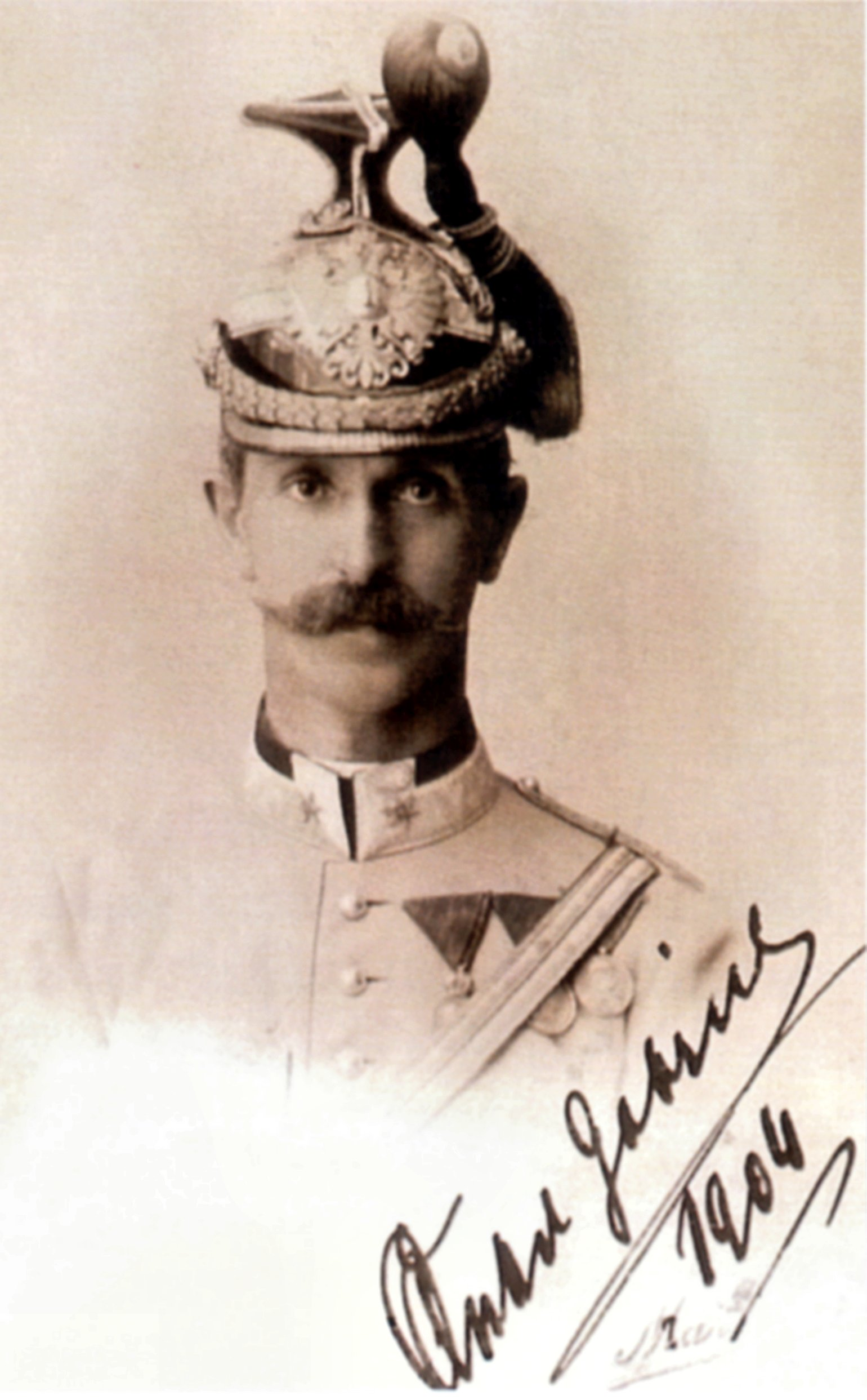 Gabriel Graf Marenzi als Major 1904